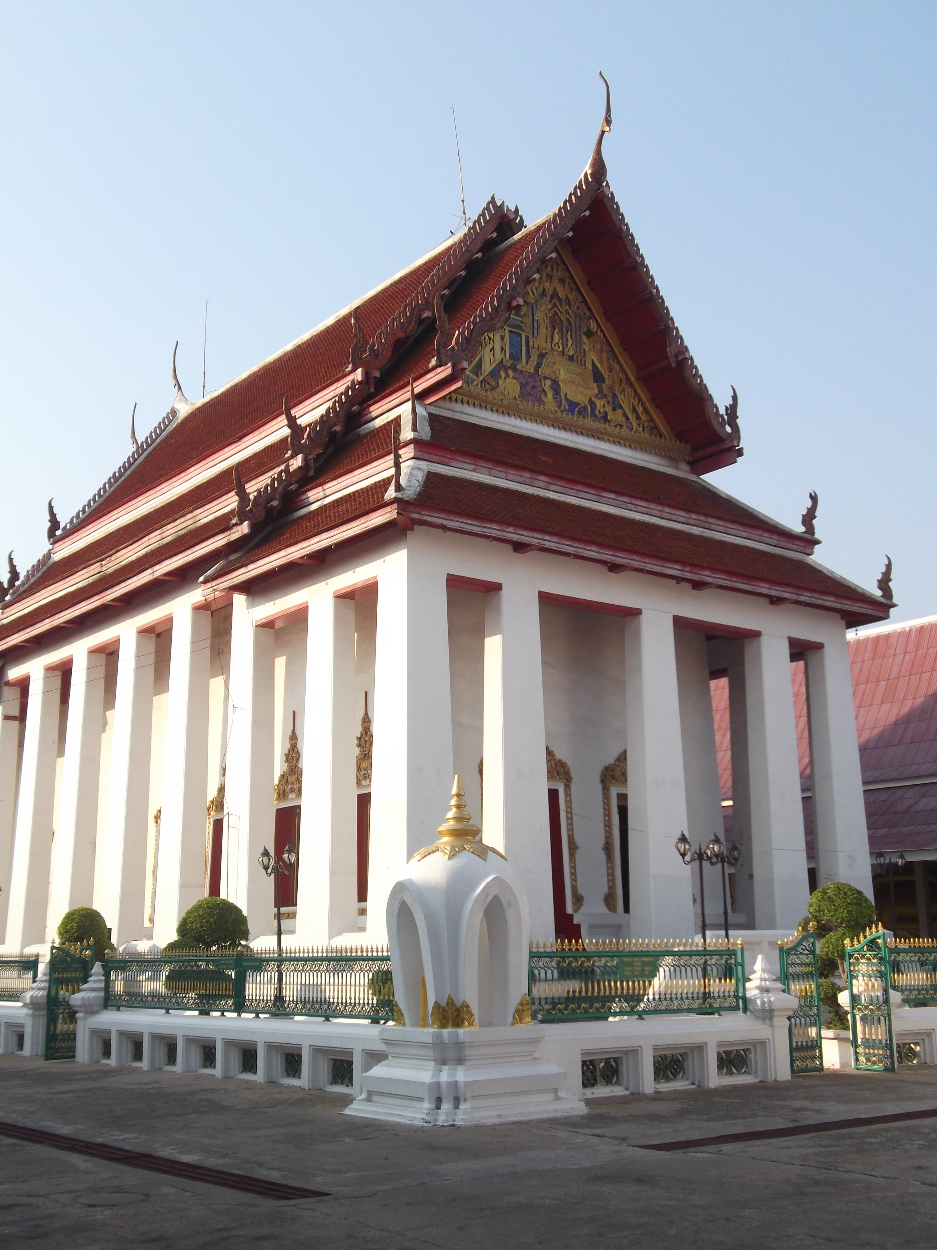 วัดเวฬุราชิณ